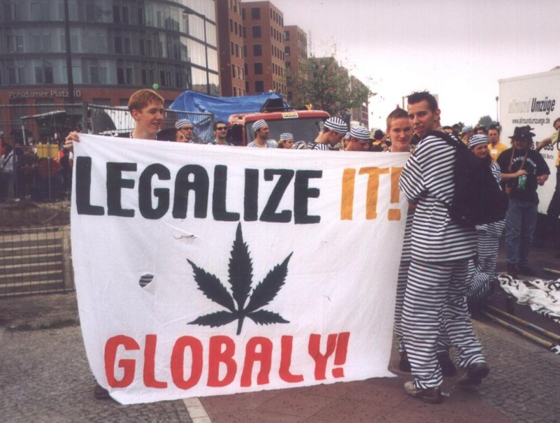 Hanfparade 2002, Leute mit Banner, Startpunkt Potsdamer Platz